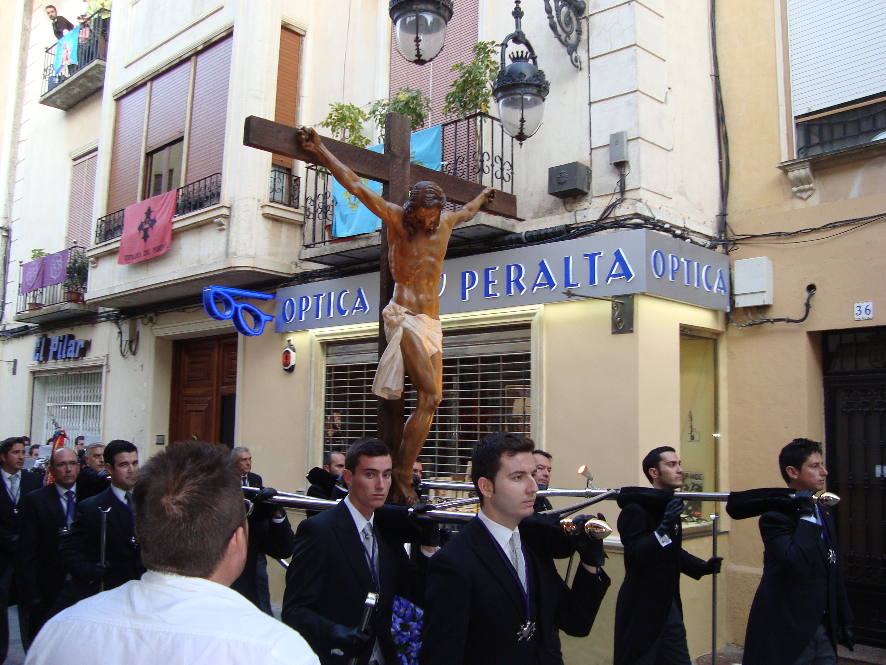 Cristo de las Santas Mujeres, obra de la década de 1990 del escultor José Vazquez Juncal. Desfila todos los Domingo de Ramos en la Semana Santa de Orihuela